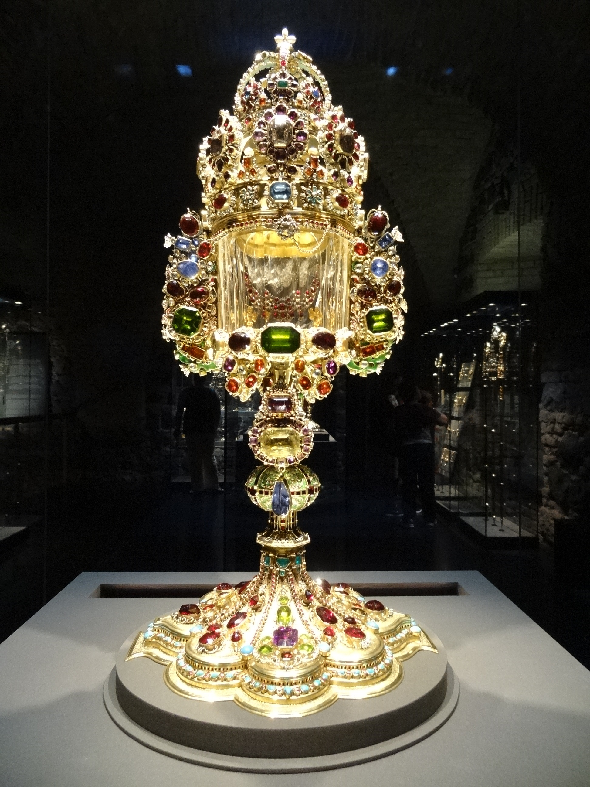 Monstranz, Christian Schweling, Köln, 1657/58, 1975 zerstört, 1978-1987 von Peter Bolg unter Verwendung erhaltener Teile rekonstruiert. Gold, Silber, vergoldet, Email, Bergkristall, Edelsteine, Perlen